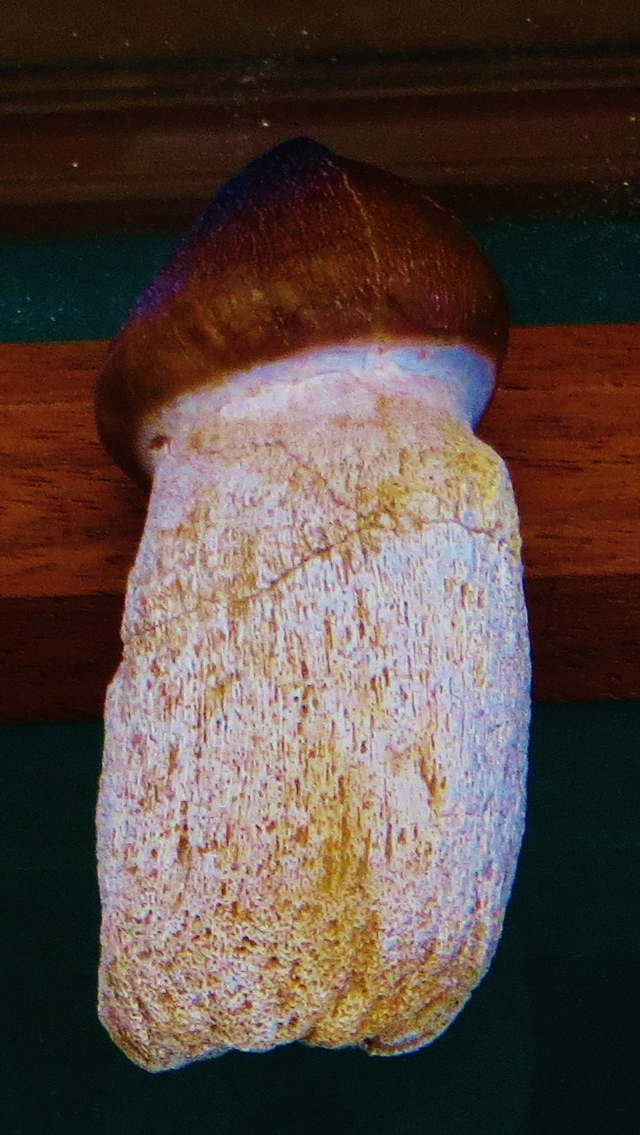 Fossil of Globidens, an extinct reptile- Took the photo at Musee d'Histoire Naturelle, Paris